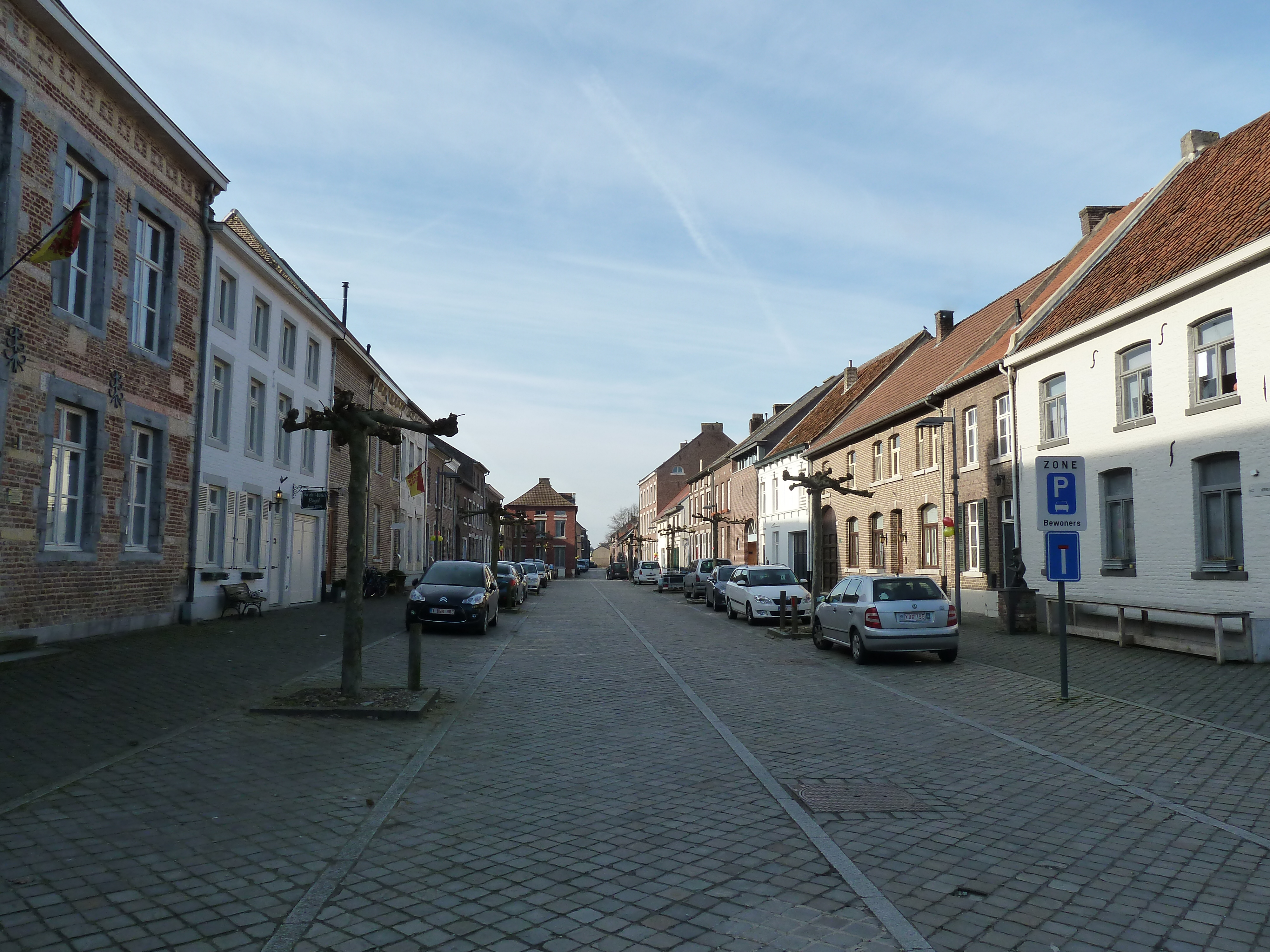 Herenstraat, Oud-Rekem, Limburg, België